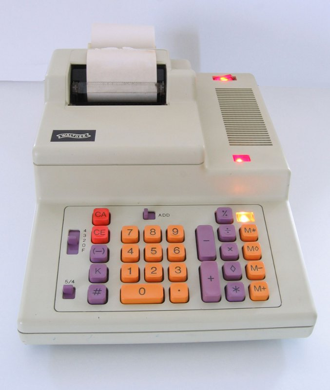 Tischrechner Walther ETR 2034S (die gelbe Lampe zeigt eine Speicherbelegung, die rote einen Fehler wie etwa Division durch Null an; hinten rechts befindet sich der rot beleuchtete Netzschalter)